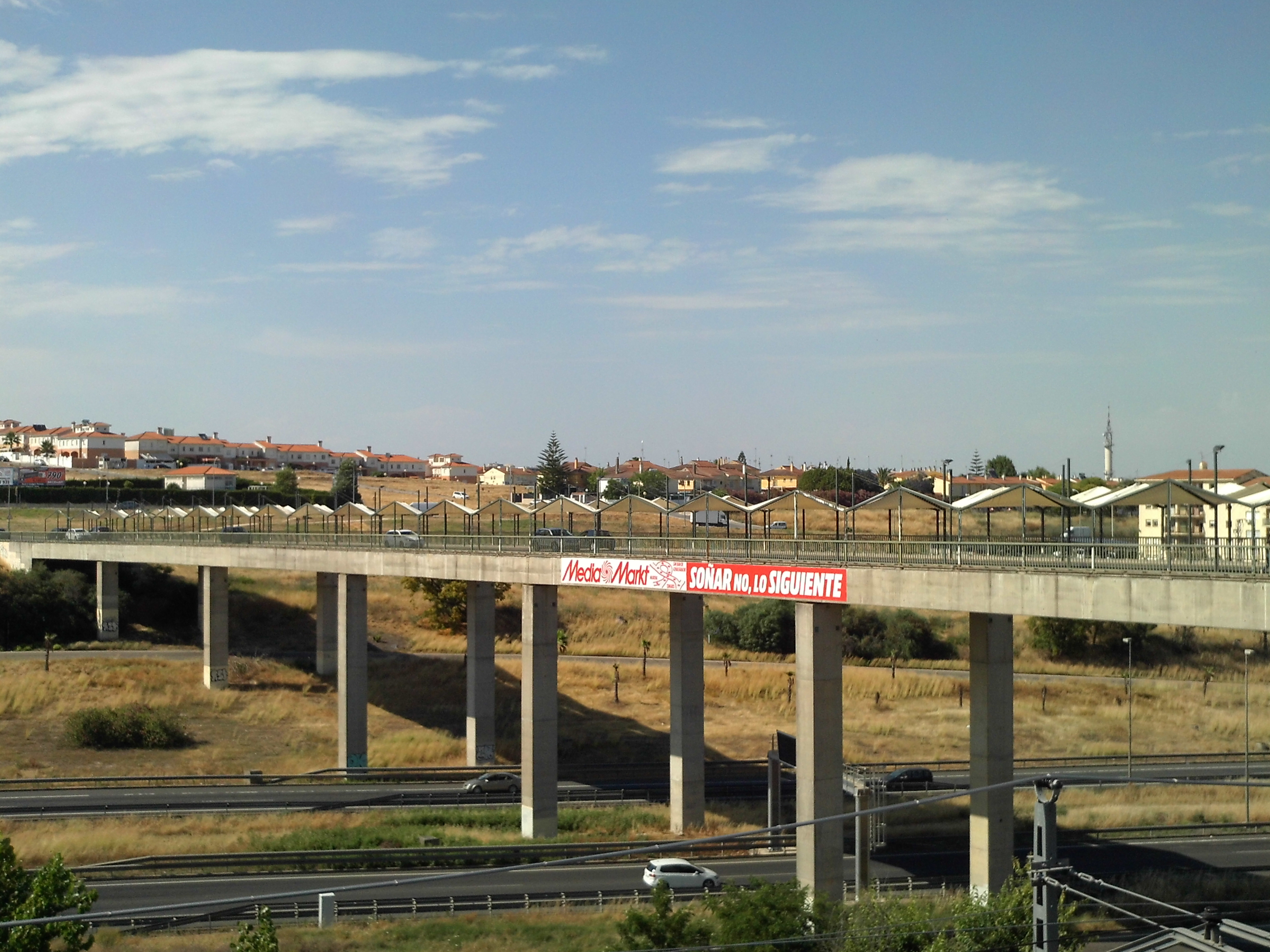 Puente sobre la A-8057. San Juan de Aznalfarache, provincia de Sevilla, Andalucía, España.